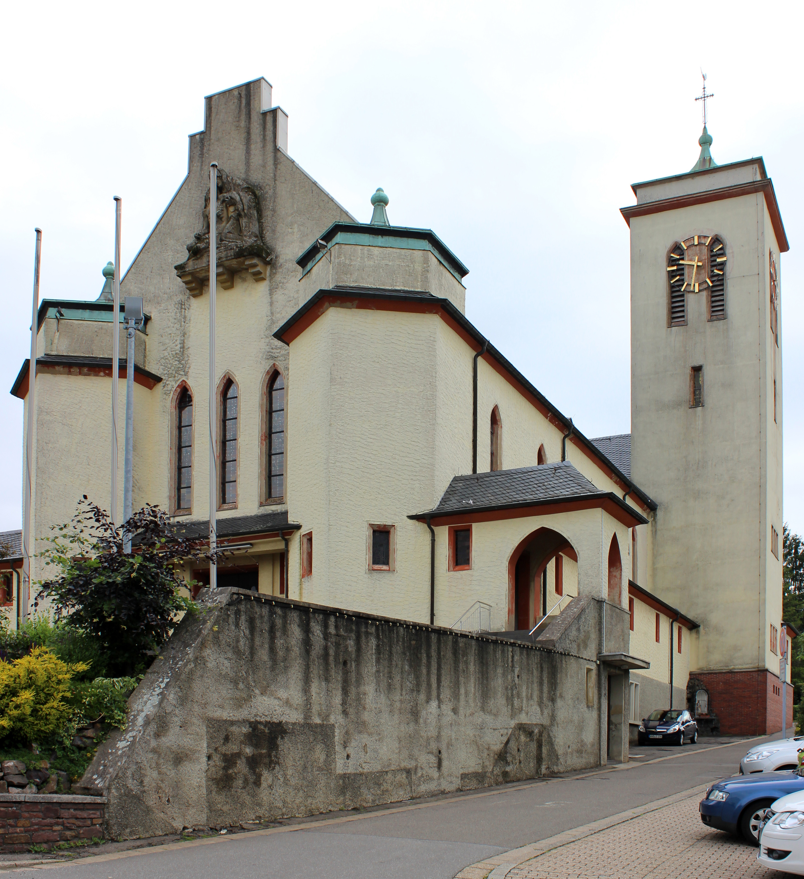 Die katholische Pfarrkirche St. Marien in Schmelz, Landkreis Saarlouis, Saarland